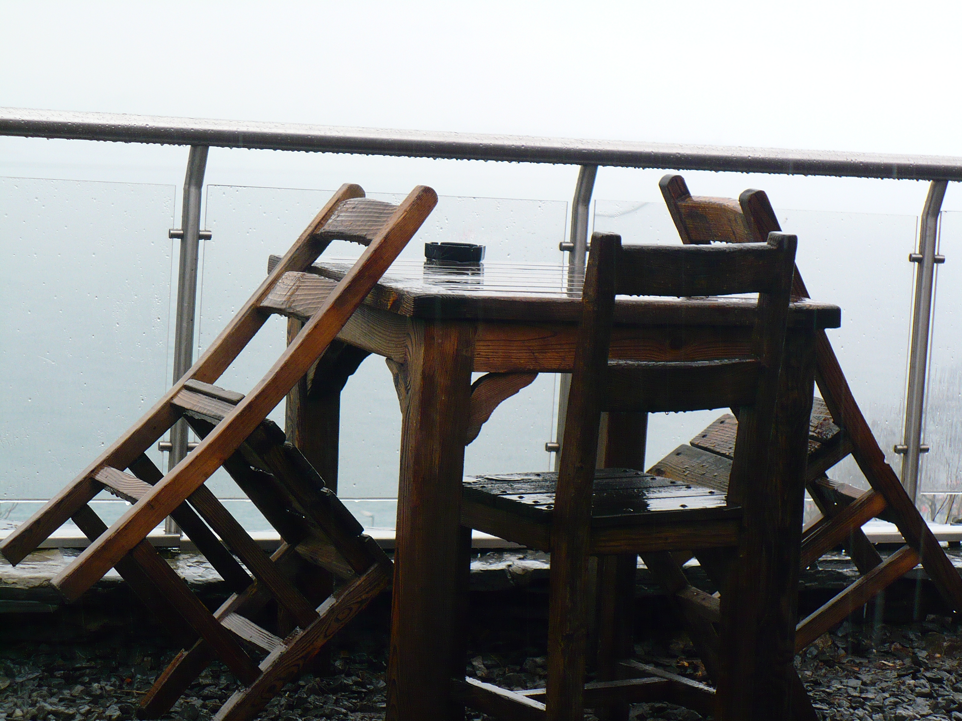 İstanbul'da bir çay bahçesi ve deniz görüntüsü